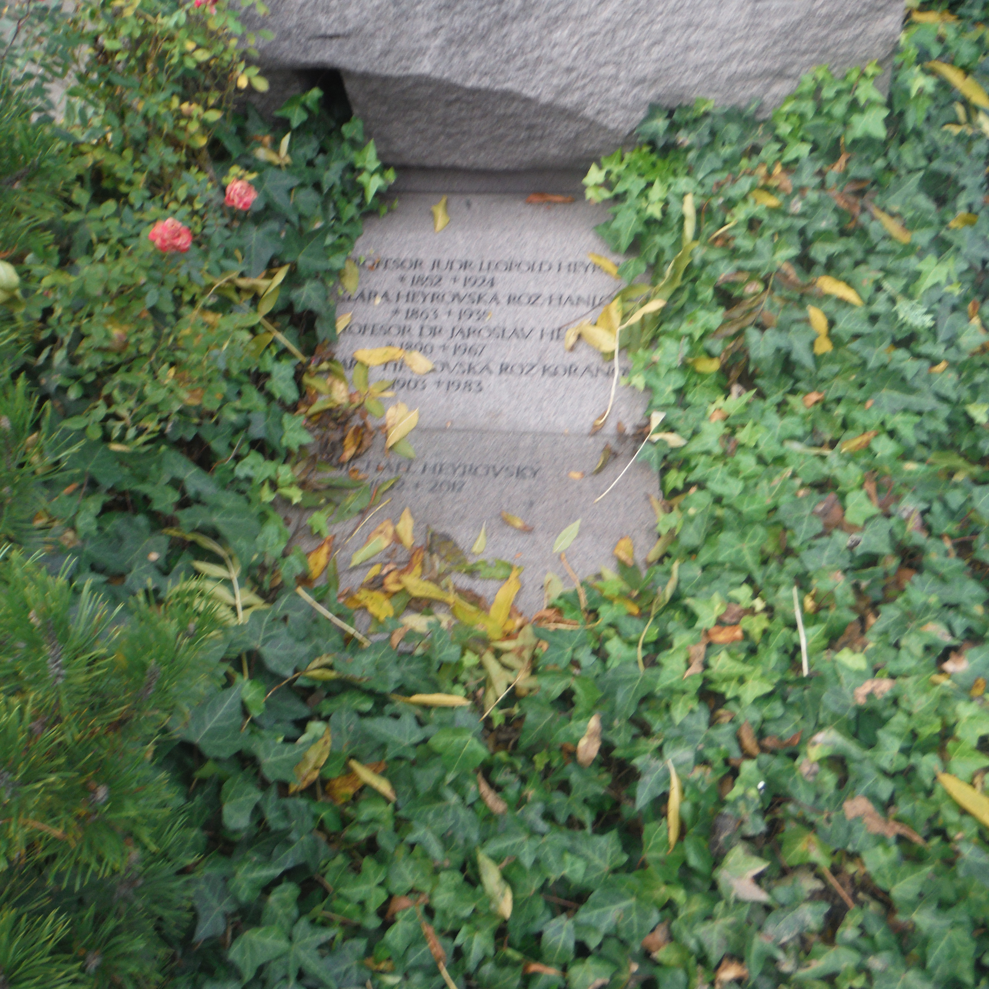 hrob